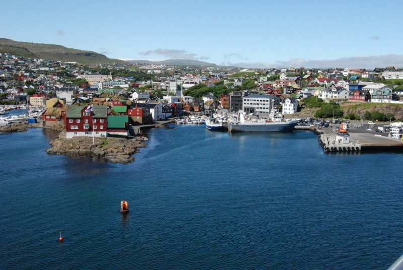 Port de Torshàvn